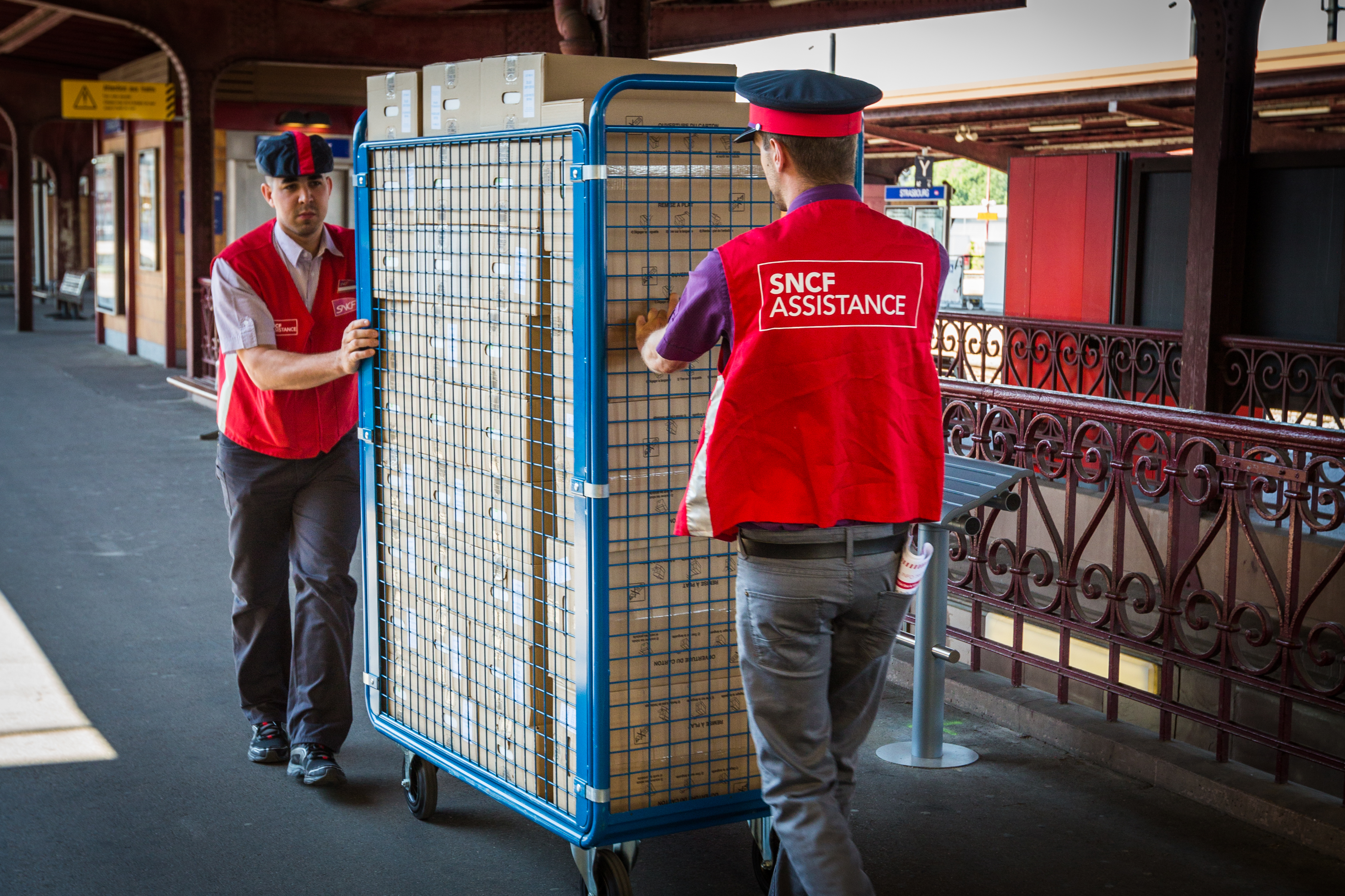 Gilets rouges en gare de Strasbourg lors du mouvement social de juin 2014